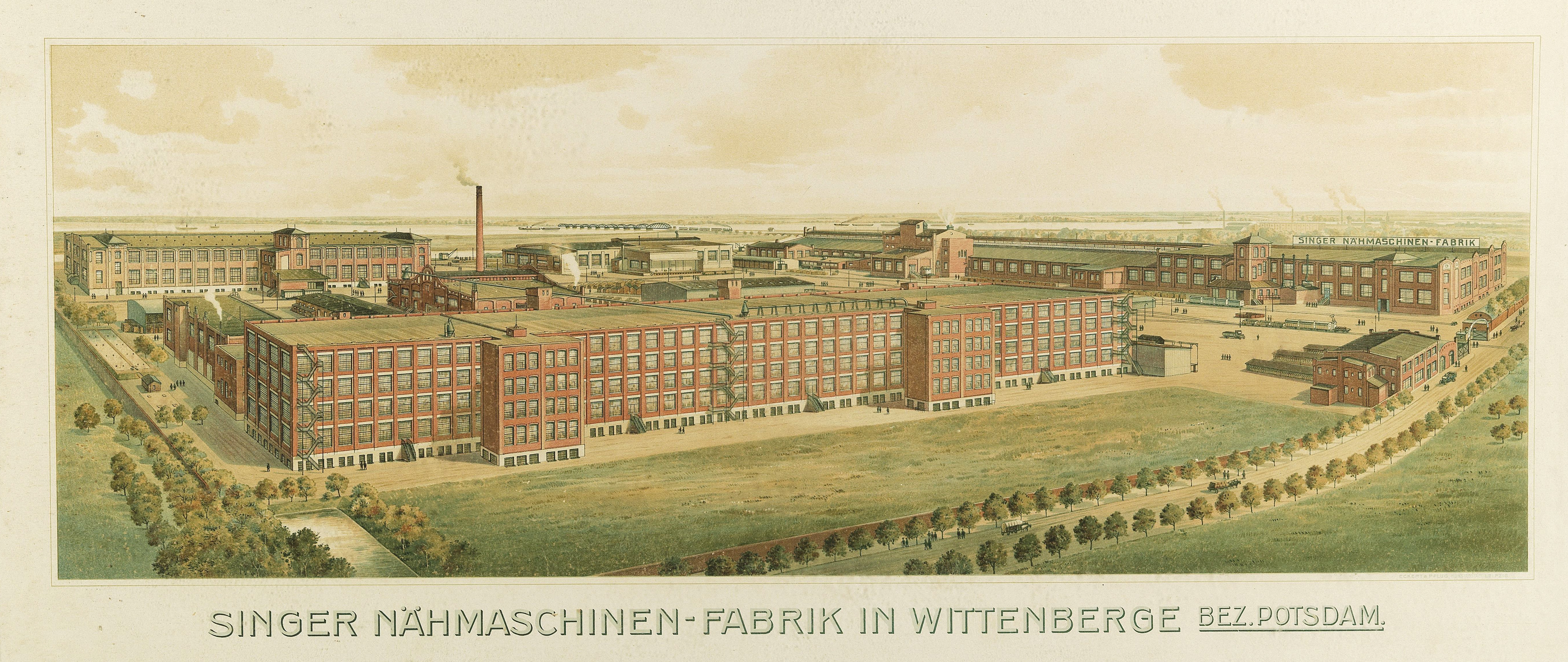 Singer Nähmaschinen-Fabrik, Wittenberge, Breite: 134 cm; Druck: Eckert & Pflug, Leipzig